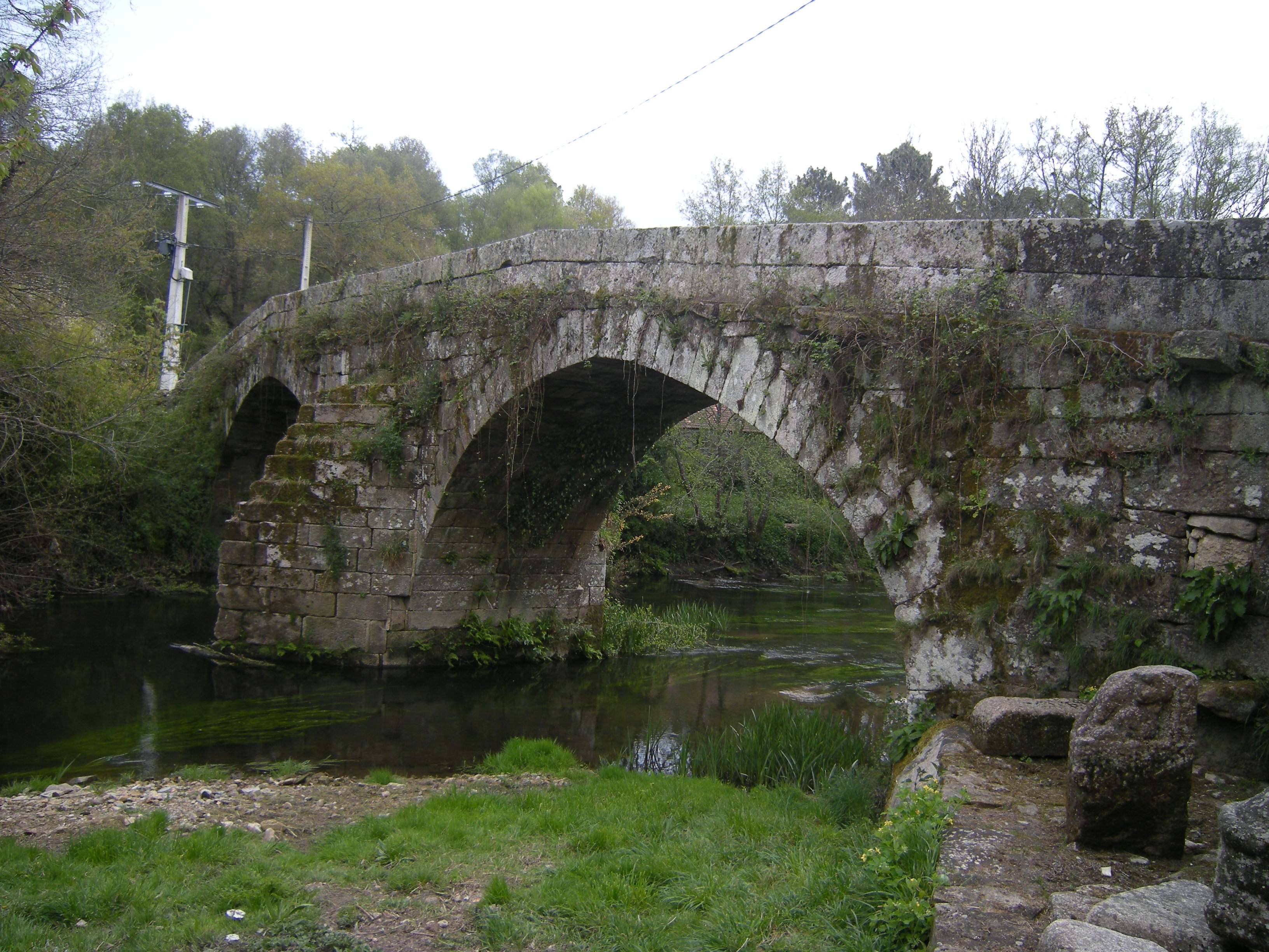 Ponte de Ponterriza sobre o río Arenteiro, entre as parroquias de Longoseiros, O Carballiño e Moldes, Boborás.